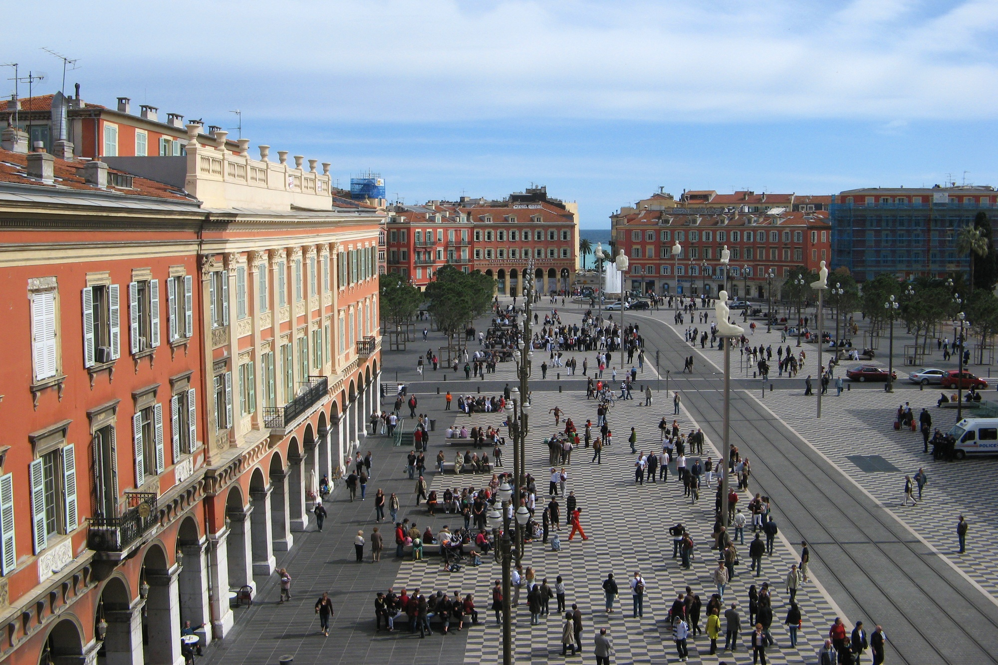 La place Masséna, vue en direction du Vieux-Nice